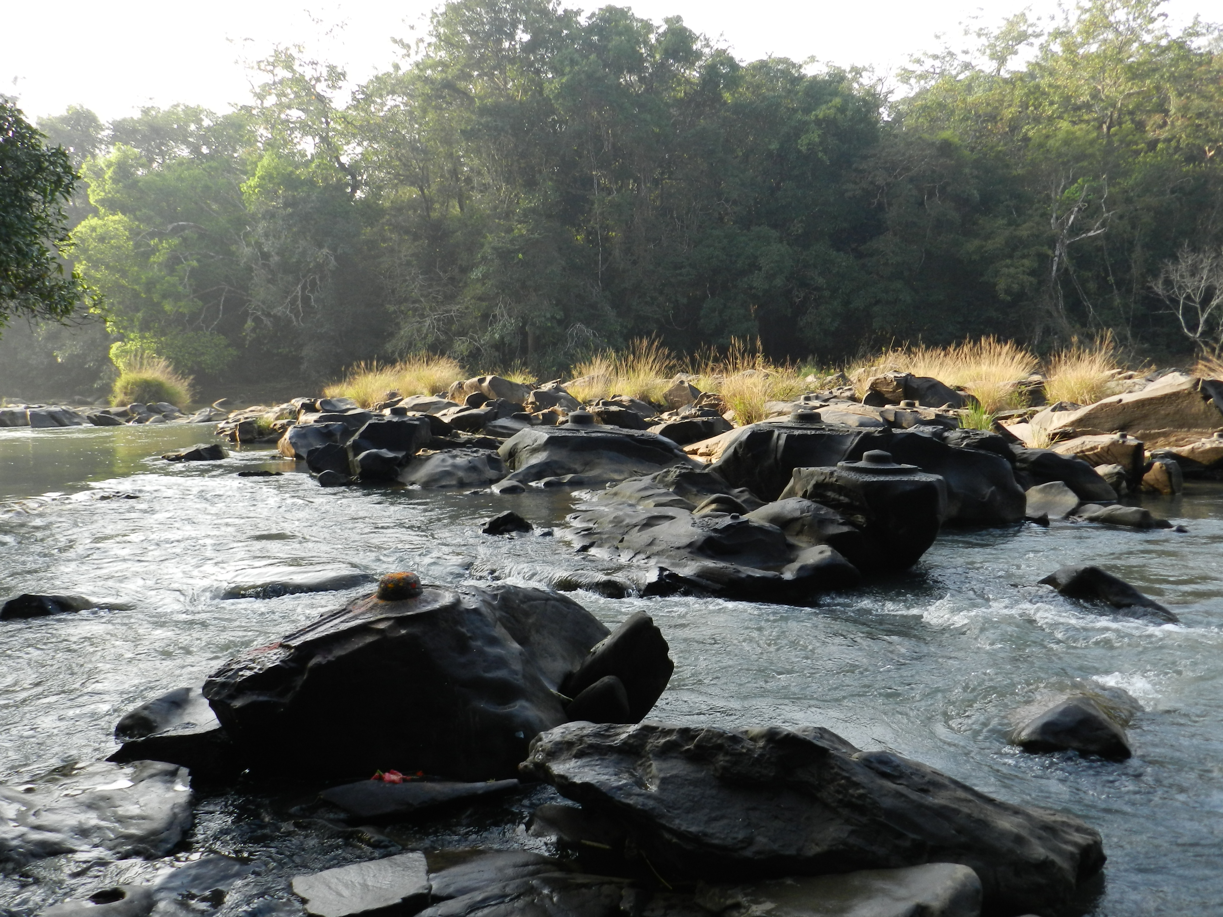 ಕನ್ನಡ: ಶಾಲ್ಮಲಾ ನದಿಯಲ್ಲಿ ಲಿಂಗಗಳ ರಚನೆ ಕಂಡುಬರುವುದು